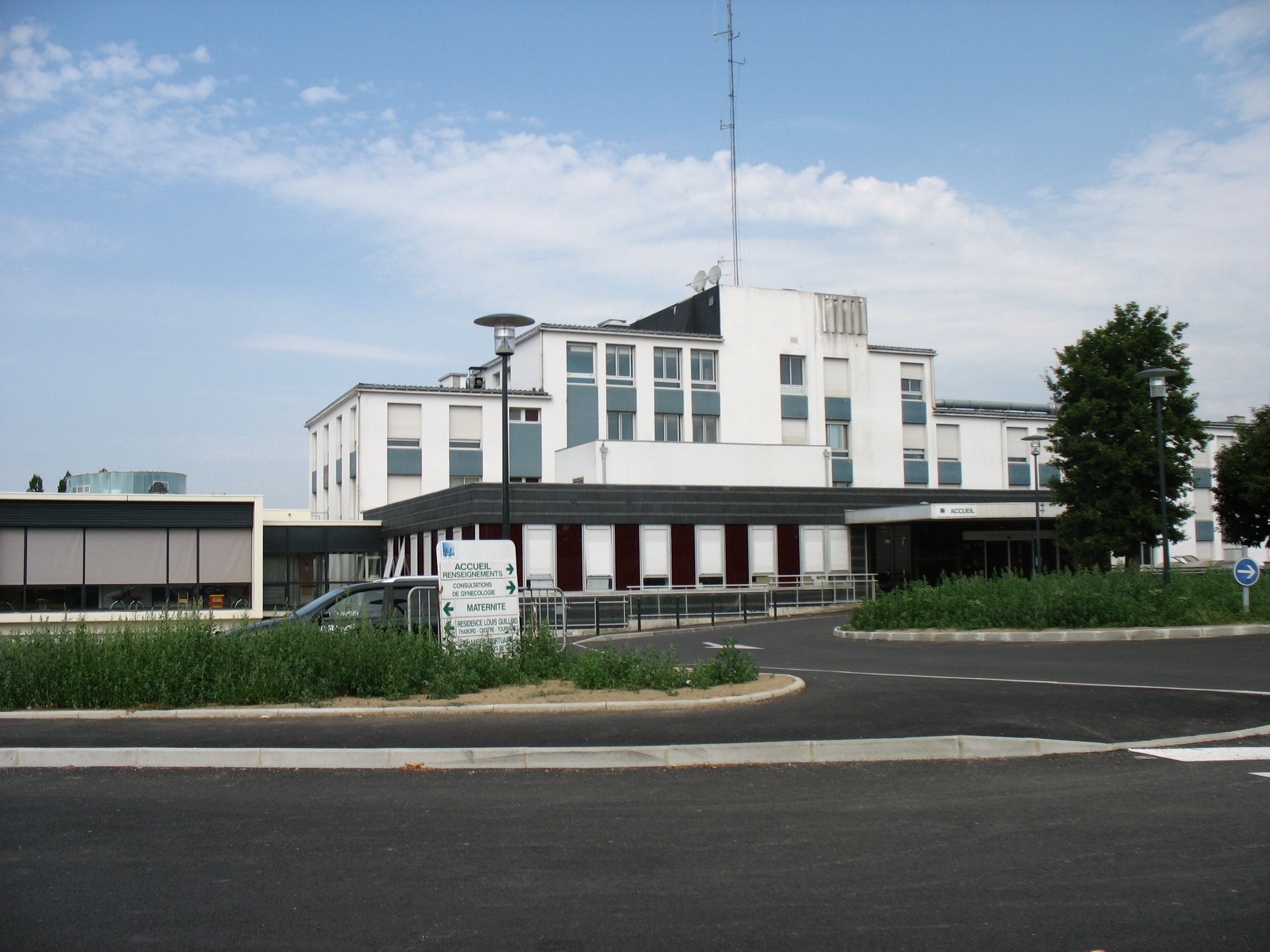 Centre hospitalier Alphonse Guérin - Ploërmel (Morbihan - France)